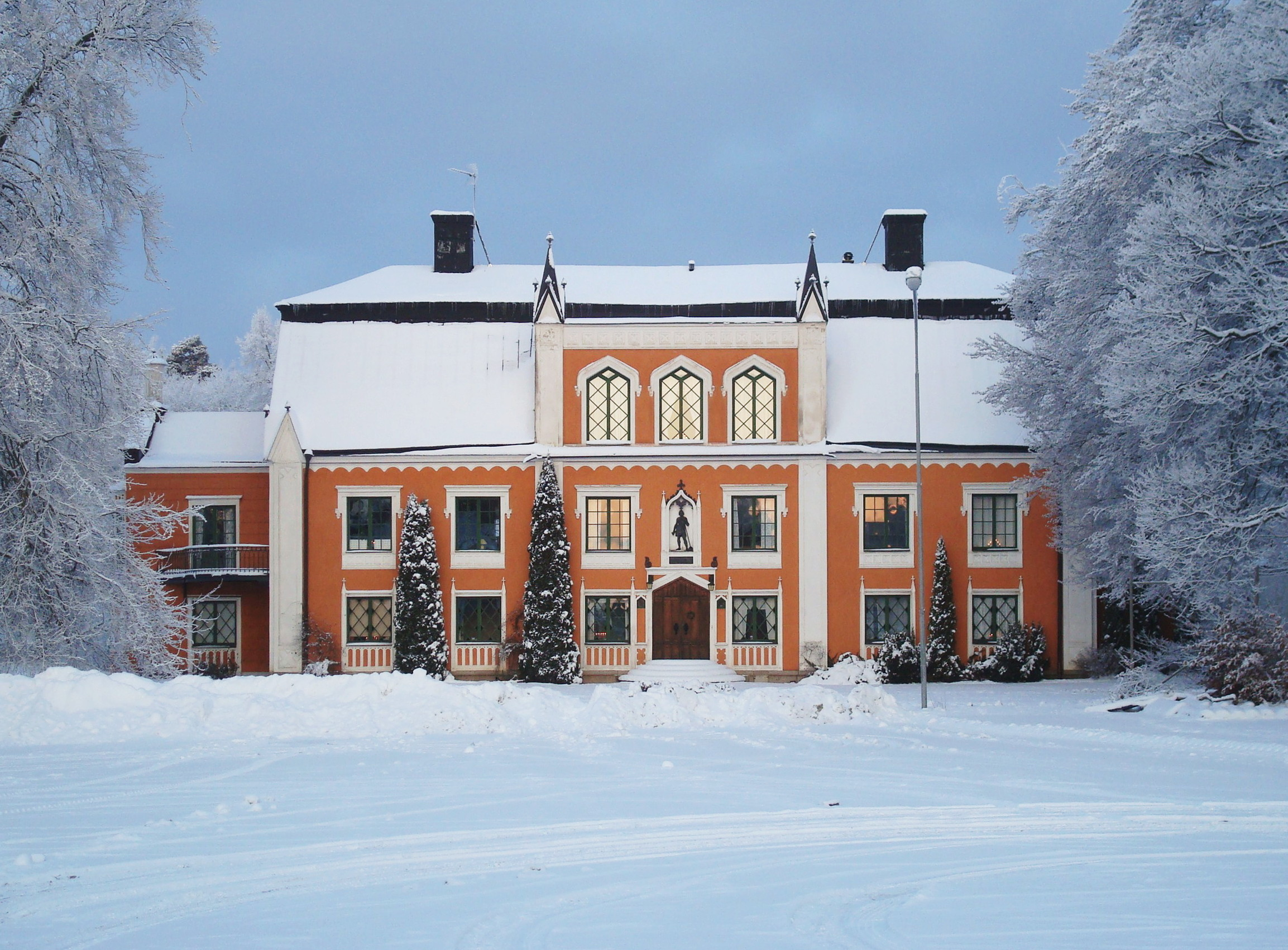 Herrgården, "Stora Huset" vid Hälleforsnäs bruk, Södermanland, Sverige.